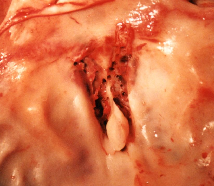 Fractura de la làmina cribosa de l'etmoide.